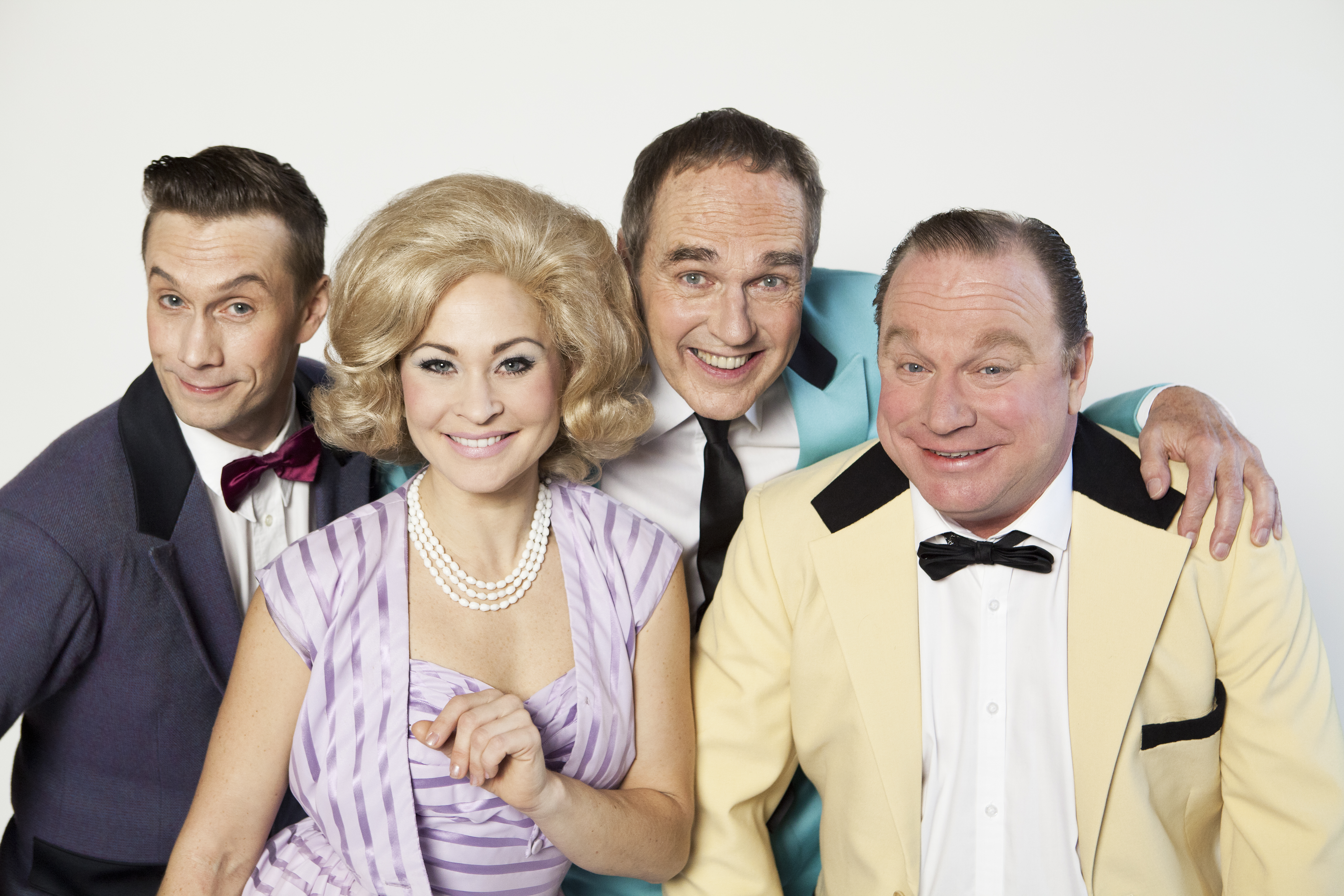 Skådespelarna Hanna Lindblad, Ola Forssmed, Claes Malmberg och Lennie Norman. Pressbild från Gunnebo Sommarteaters kommande uppsättning av Från Parken till Vegas.